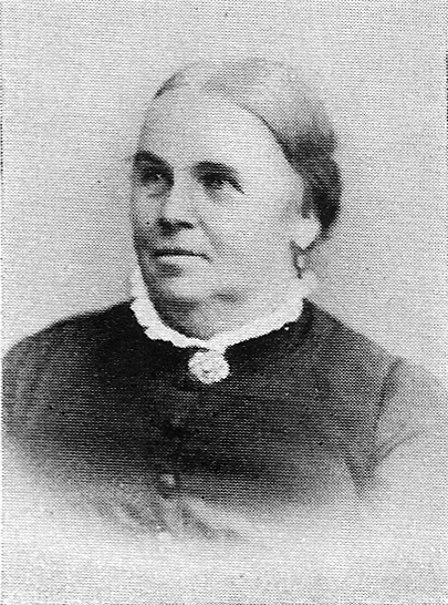 Julie (Karoline Luise) Kommerell geb. Steudel (1825-1886), Frau von Ferdinand Kommerell